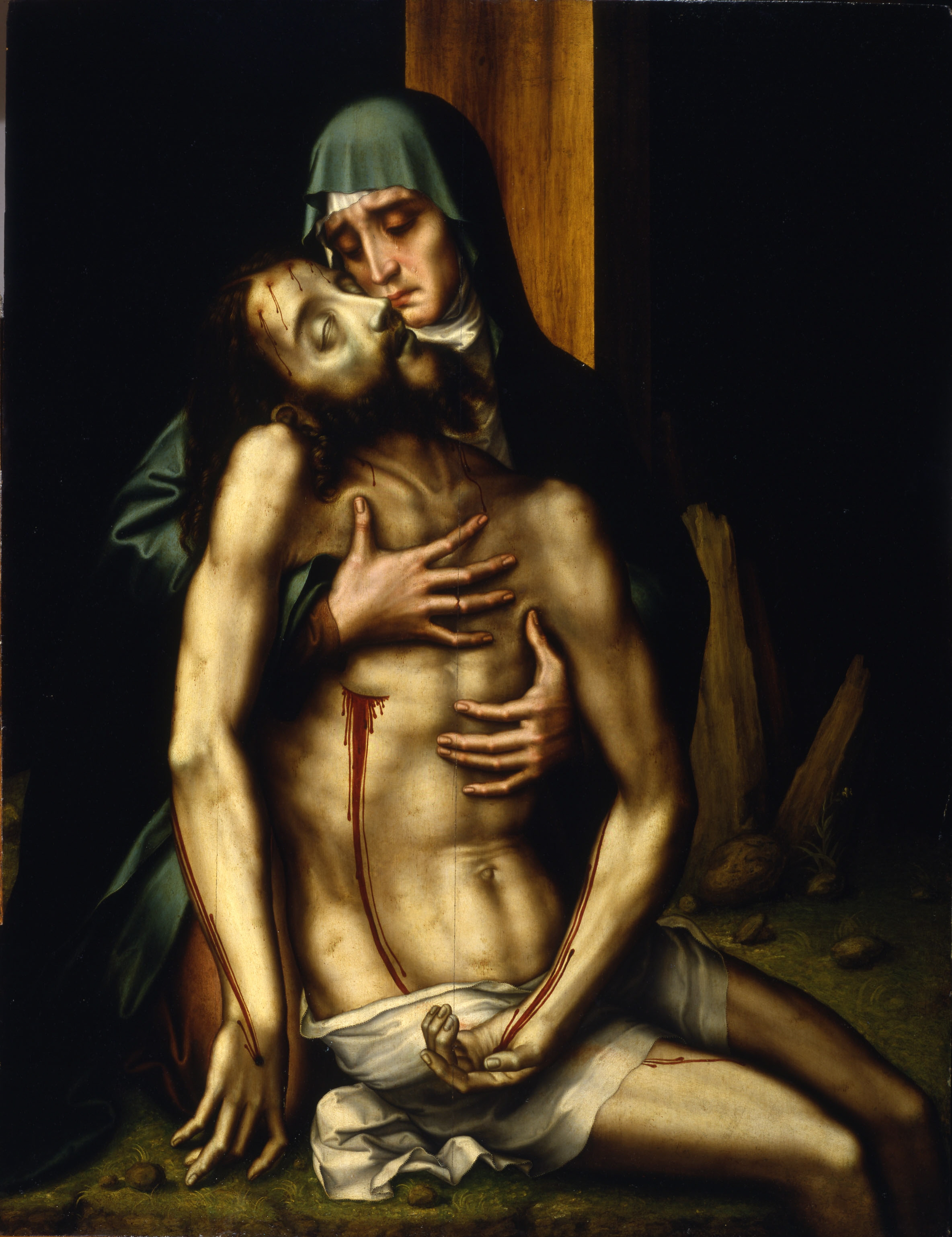 La obra representa a Jesucristo muerto y en los brazos de su madre, la Virgen María, que se lamenta de la muerte de su hijo.